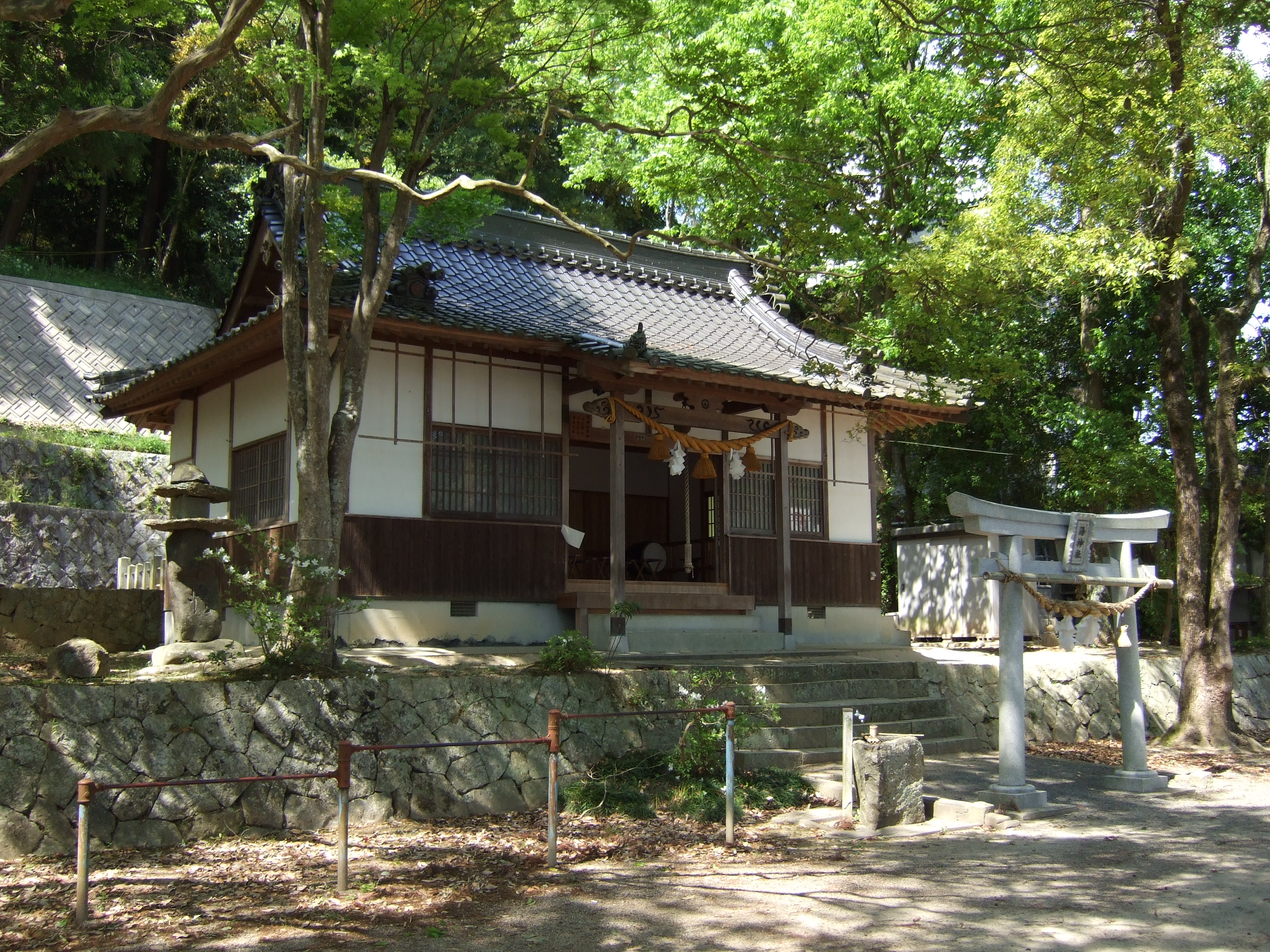 湯郷